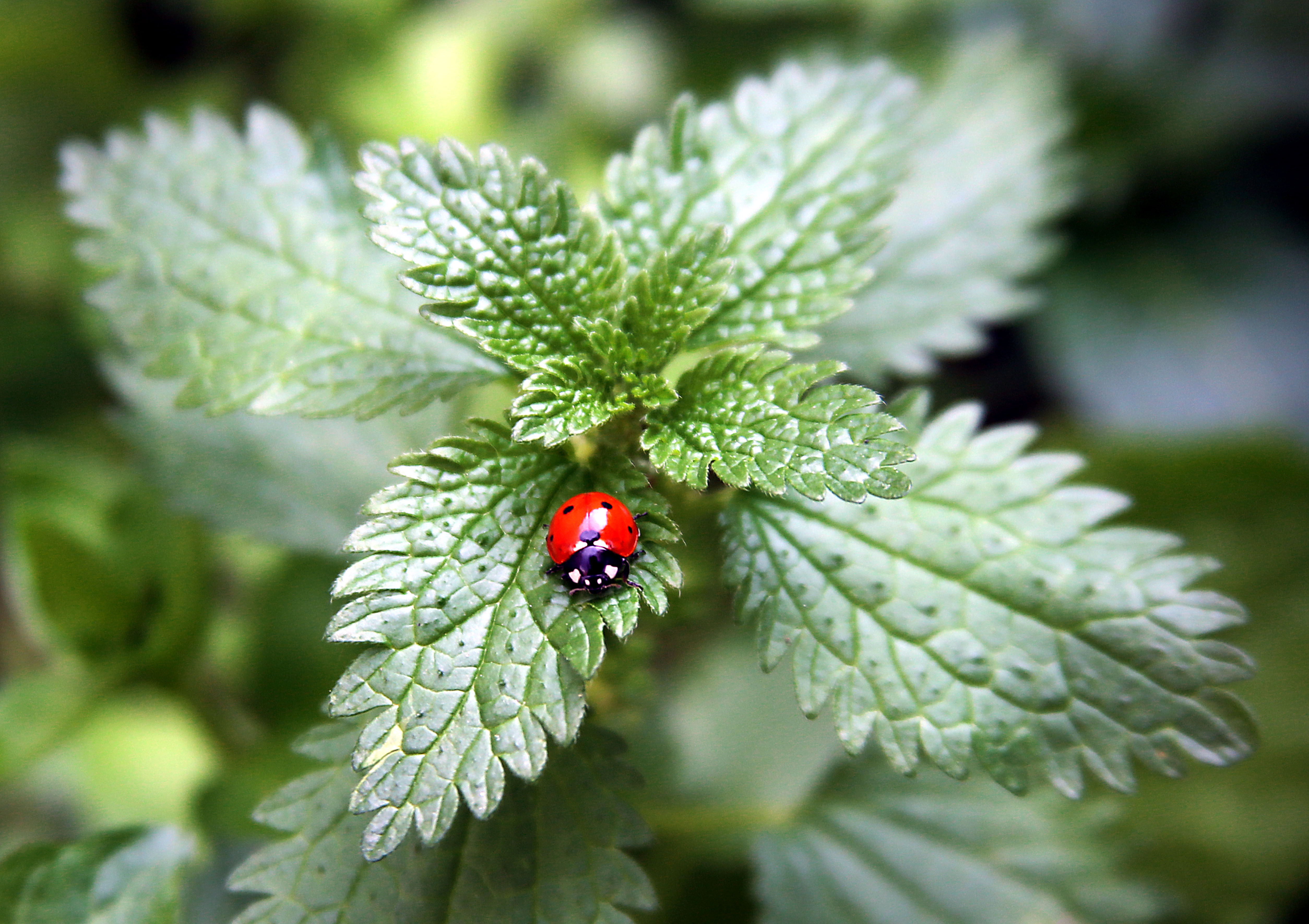 حشرة ام سليمان